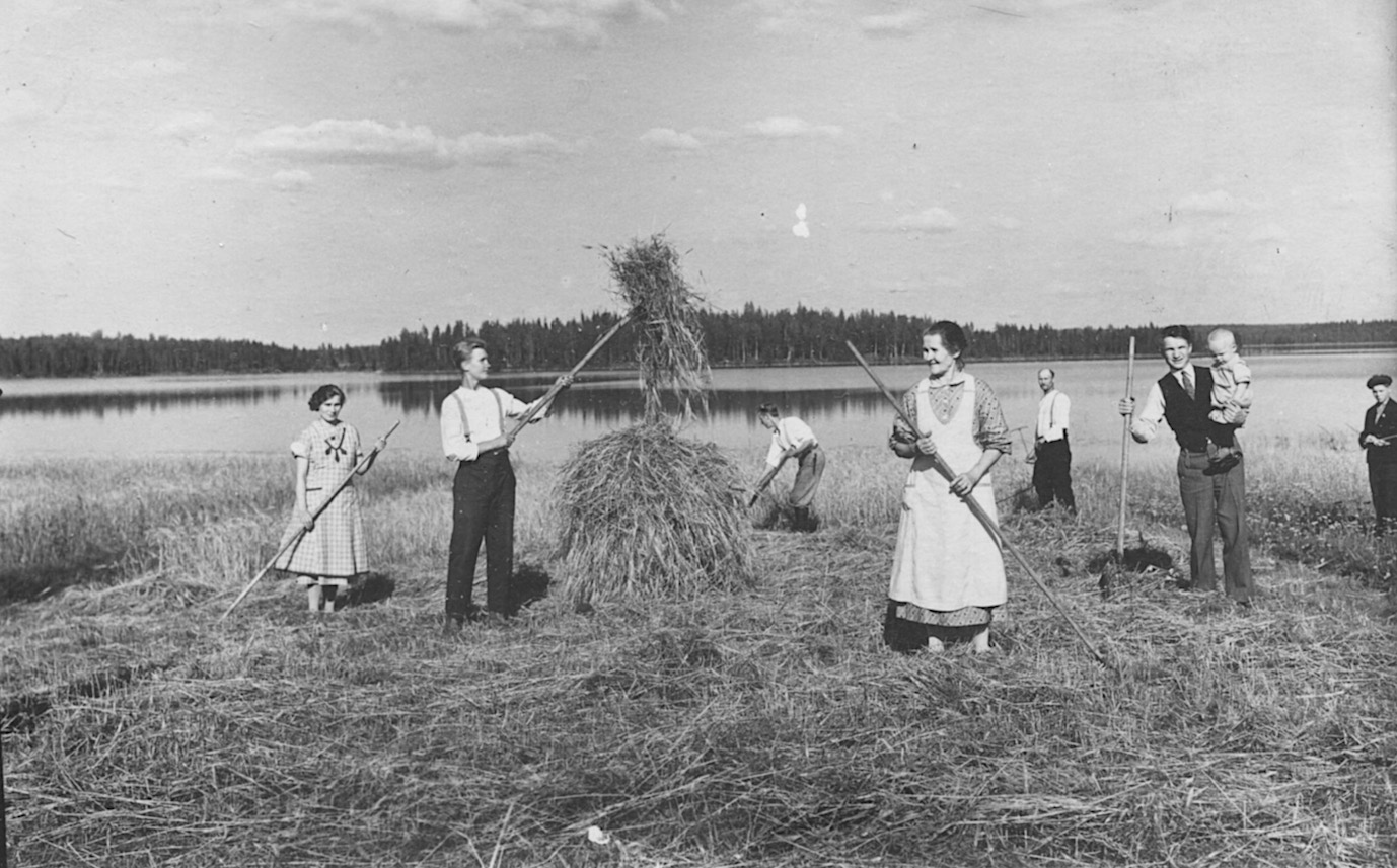 Heinäpellolla Aurejarvella